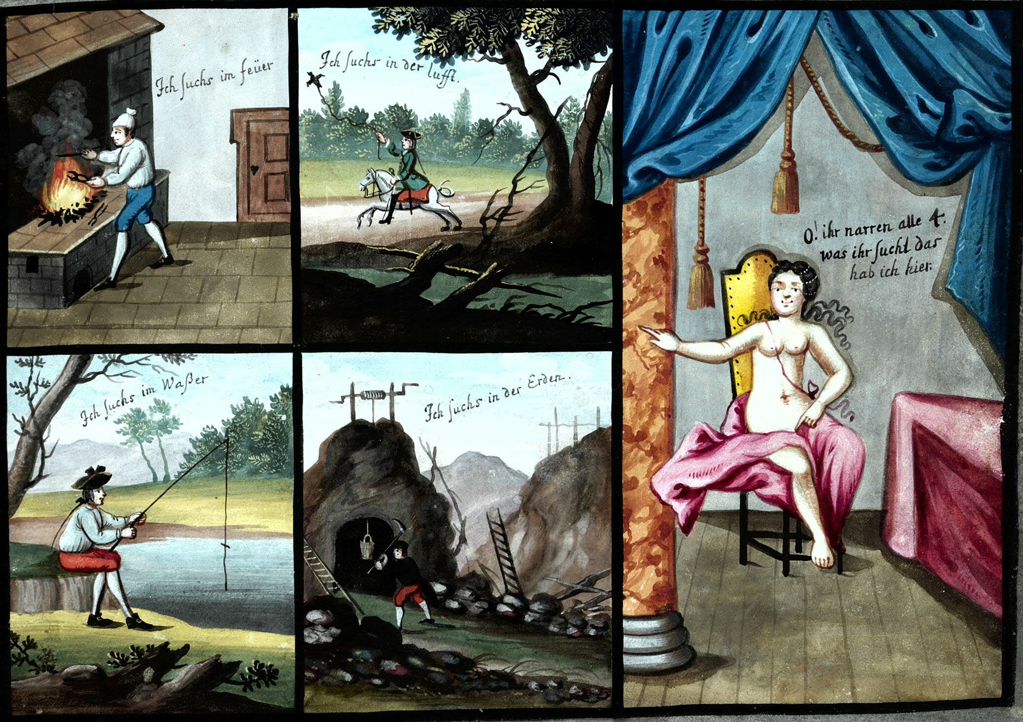 Auszug aus dem Serreschen Studentenalbum